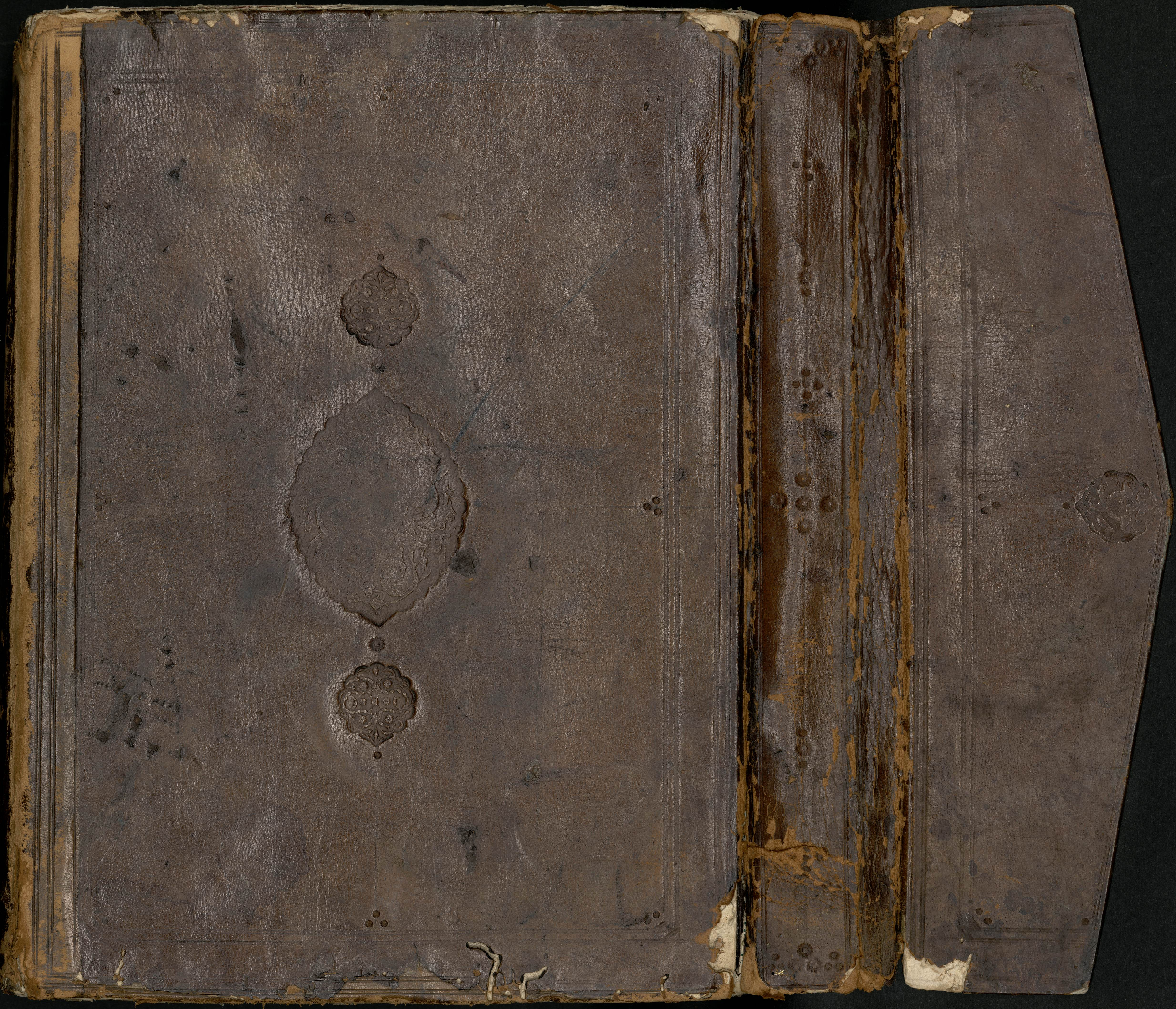 Reliure à rabat, manuscrit ms 1130 180 feuillets / Papier / 355 x 260 mm